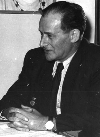 Title: Berlin, 3. Deutscher Schriftsteller-Kongress People in the image: Wolf, Friedrich Prof. Dr.: Arzt, Schriftsteller, Mitglied der Kommunistischen Partei Deutschlands (KPD), Botschafter in Polen, DDR Factual corrections and alternative descriptions are encouraged separately from the original description. Additionally errors can be reported at this page to inform the Bundesarchiv. Original historic description: Zentralbild-Gielow 23.5.52 III.Deutscher Schriftstellerkongreß vom 22.-25. Mai 1952 in Berlin. UBz: Friedrich Wolf im Gespräch mit Annemarie Koffler, der Präsidialrätin des Kulturbundes in Greifswald.